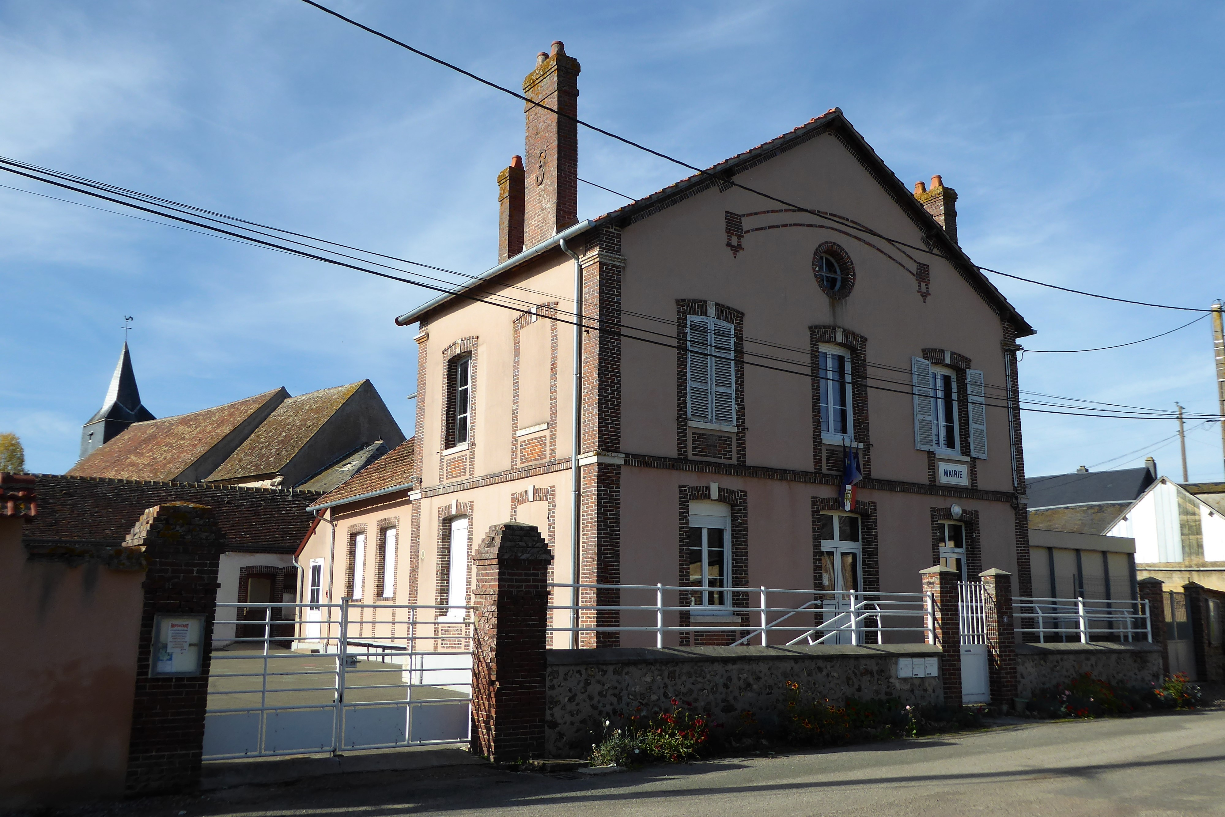 mairie et église Saint-Gilles, Charonville, Eure-et-Loir, France.